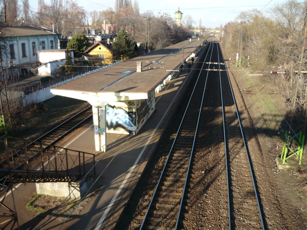 Istvántelek vasúti megállóhely, Budapest